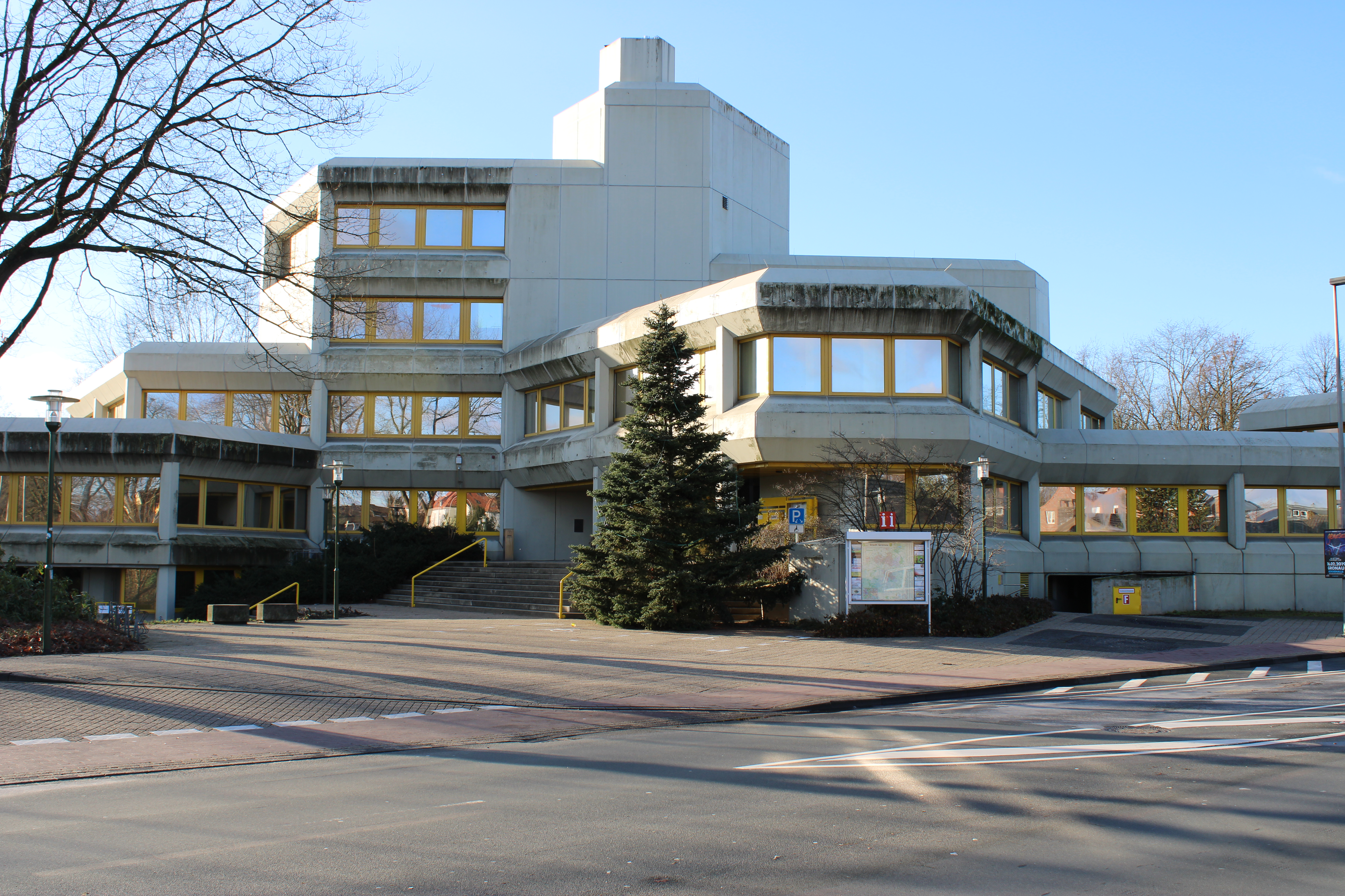 Aktuelles Rathaus in Gronau/Westf.